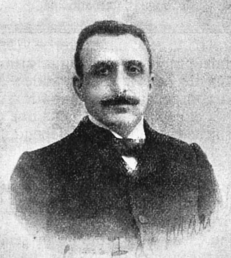 Leon Bollack, twórca języka Bolak.